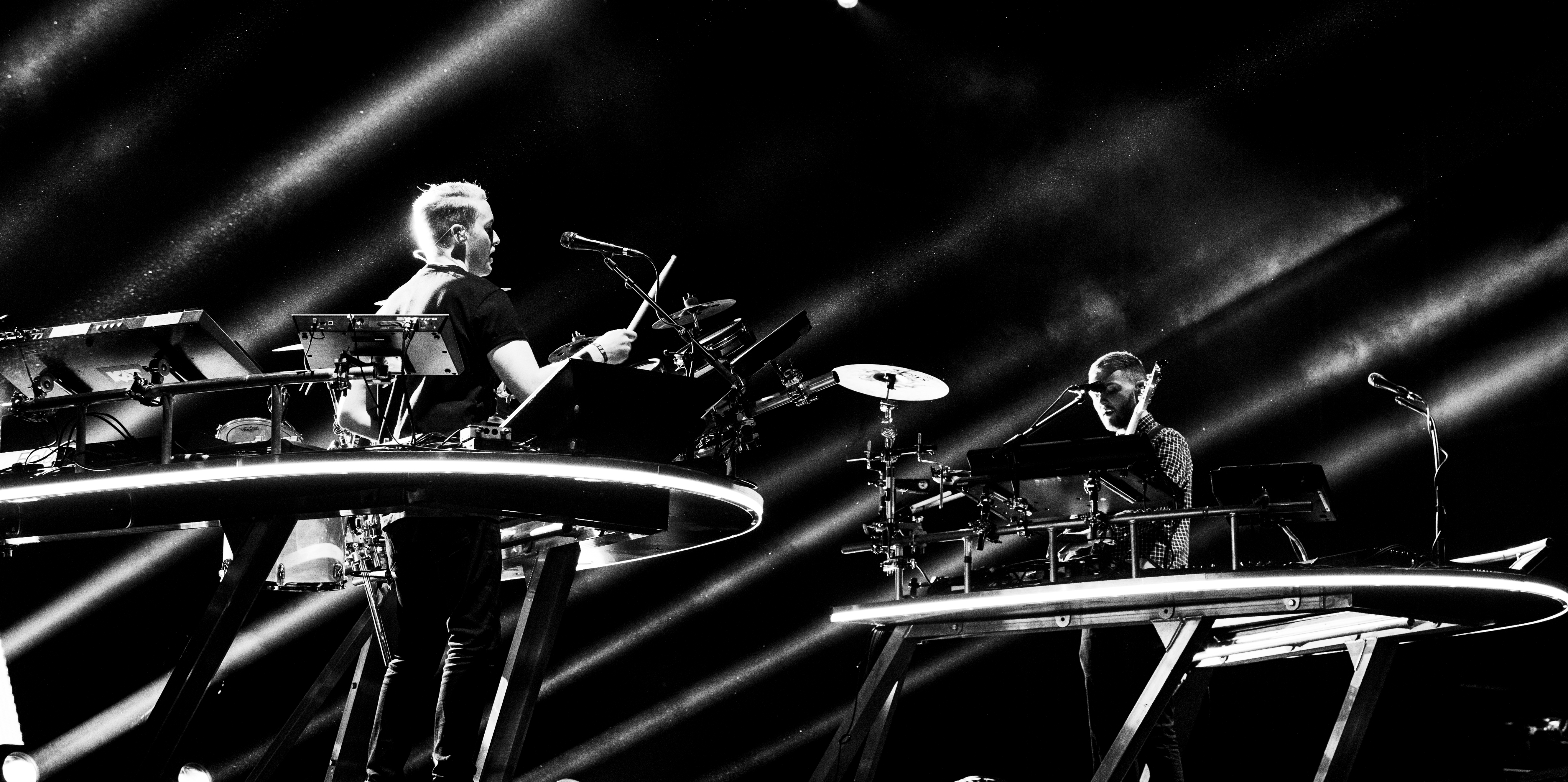 FIB 2016